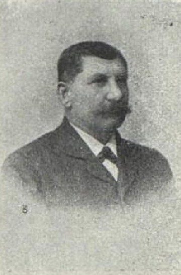 František Vaněk (1864-1912), rakouský a český politik